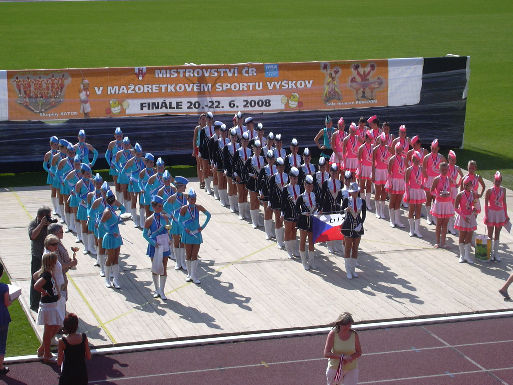 MČR_v_mažoretkovém_sportu 2008 ve Vyškově konané ve dnech 20.6 - 22.6.2008